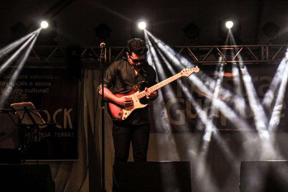 Lucas Gallon em show (2015)